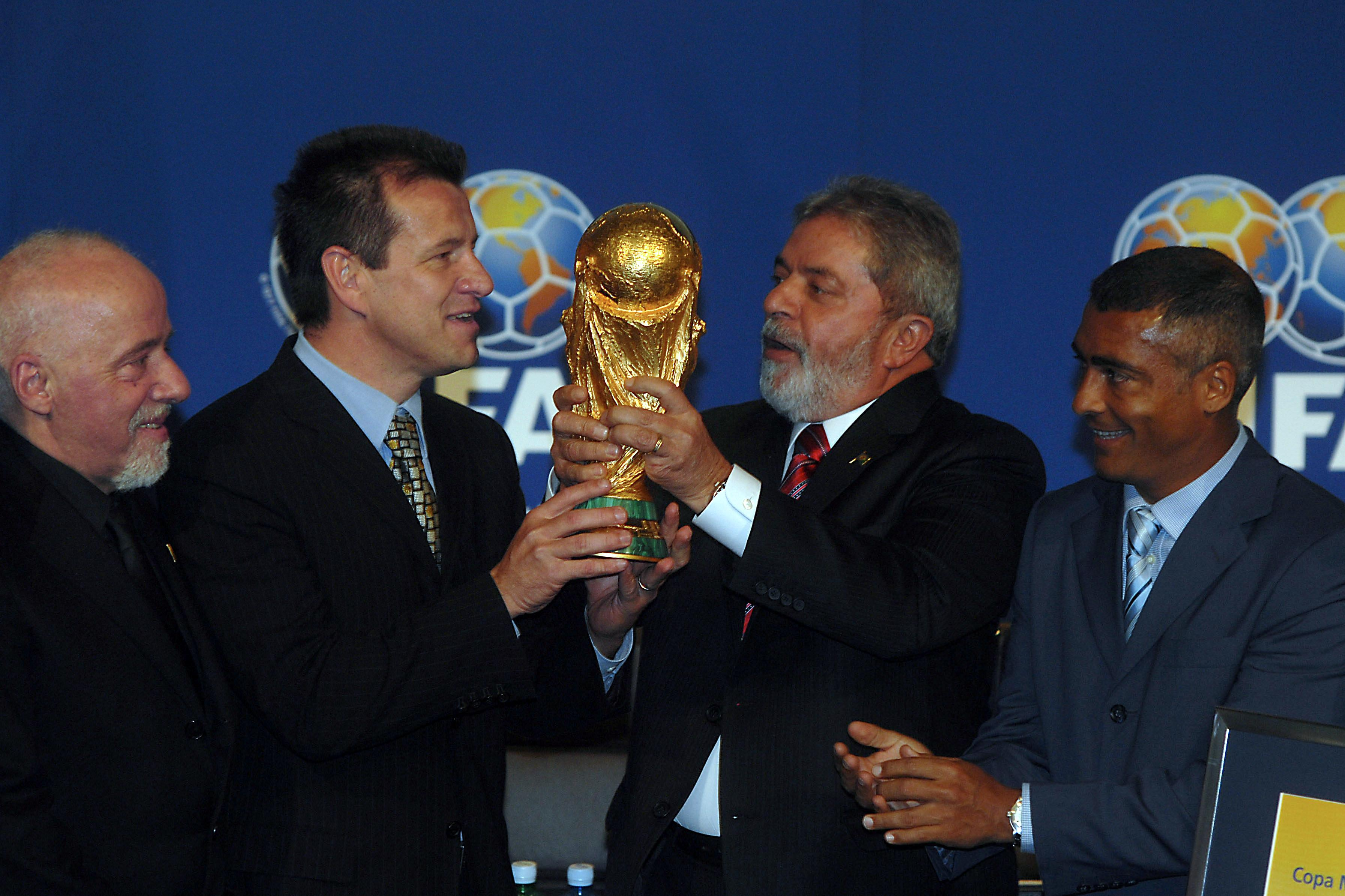 Zurique (Suíça) - O presidente Luiz Inácio Lula da Silva e o técnico da seleção brasileira, Dunga, seguram taça na cerimônia que confirma o Brasil como sede da Copa do Mundo de 2014. À esquerda, o escritor Paulo Coelho, e à direita, o jogador Romário